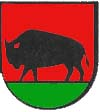 Herb wsi Pewelka (gmina Stryszawa)